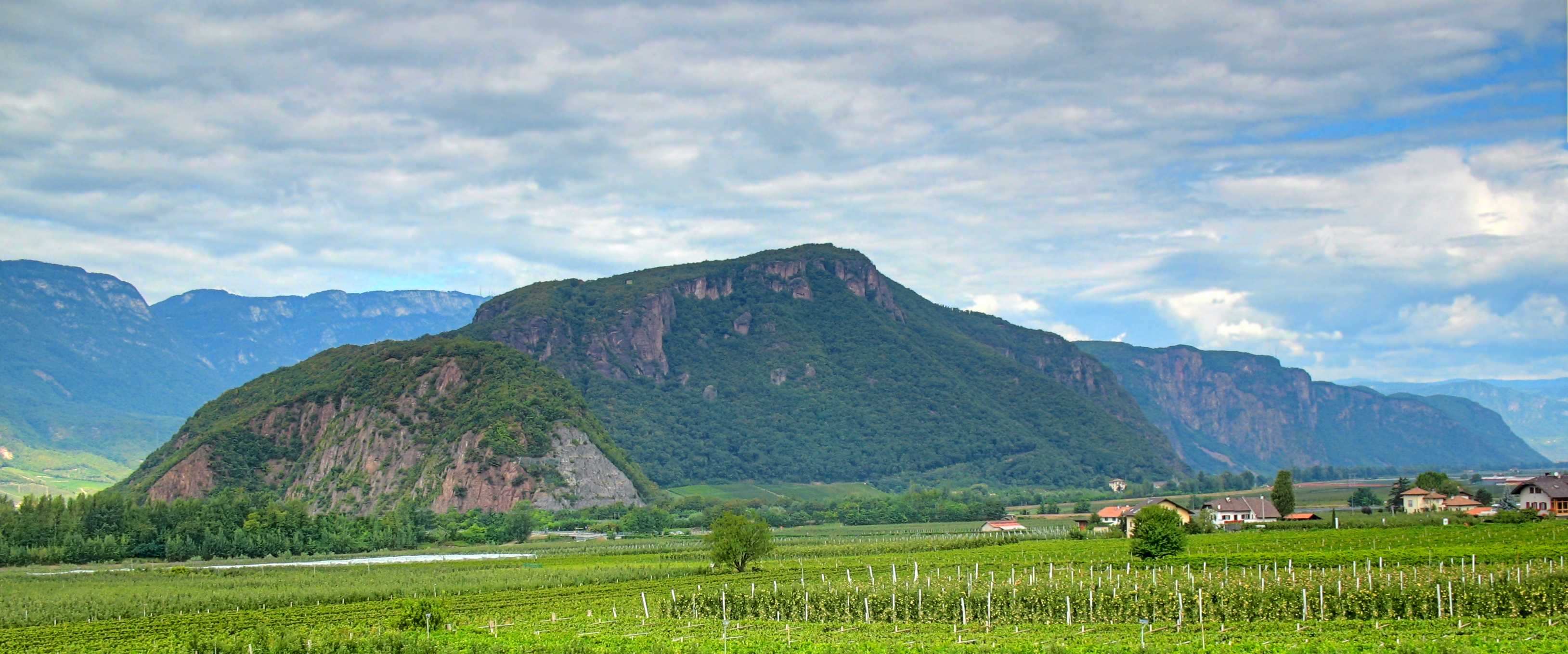 Italien, Südtirol, Auer, Blick auf den Mitterberg, Tone-mapped HDR-Bild